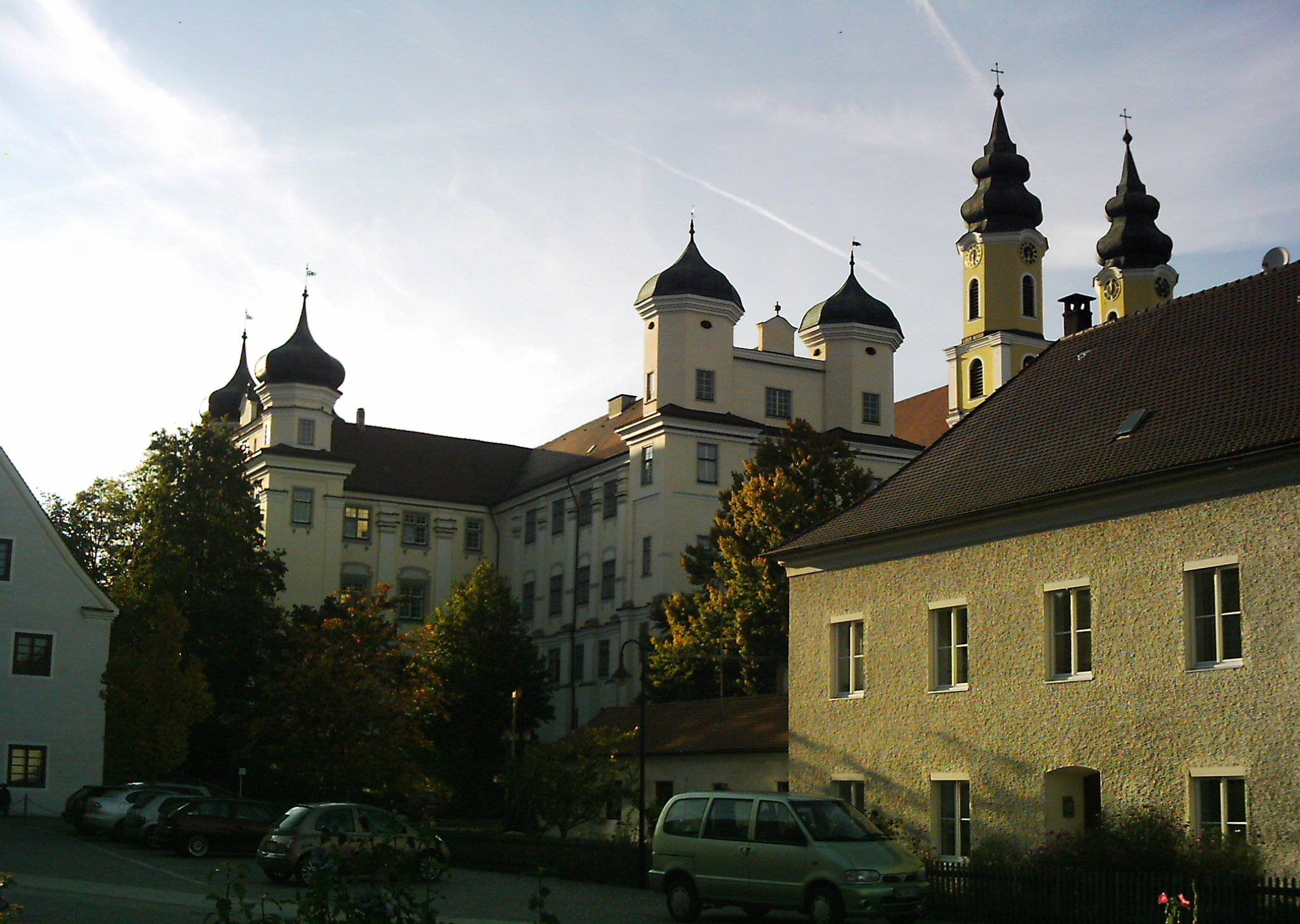 Ehem. Reichsabtei der in Prämonstratenser Rot an der Rot